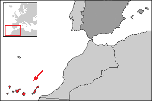 Situación de Canarias respecto a España